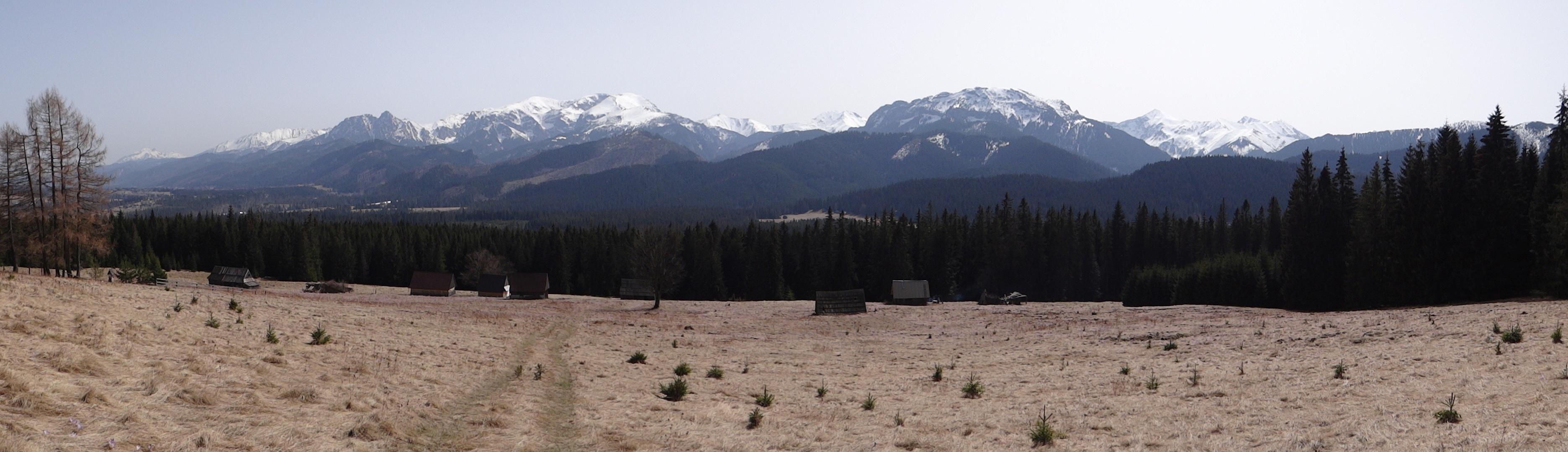 Widok z polany Koszarzyska na pasmo regli i wyższe szczyty Tatr